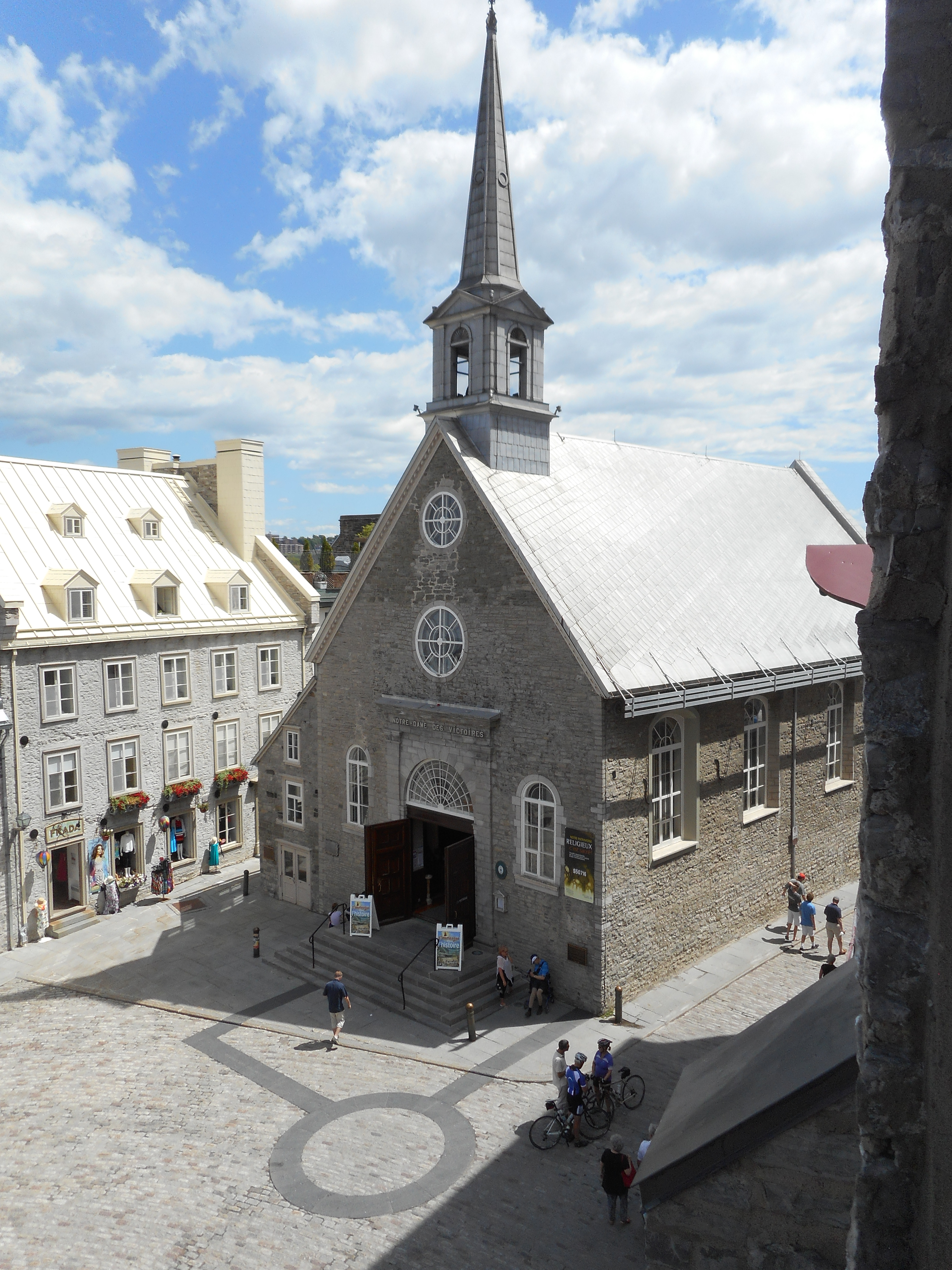 La Place Royale dans la Basse-Ville du Vieux-Québec Notre-Dame-des-Victoires